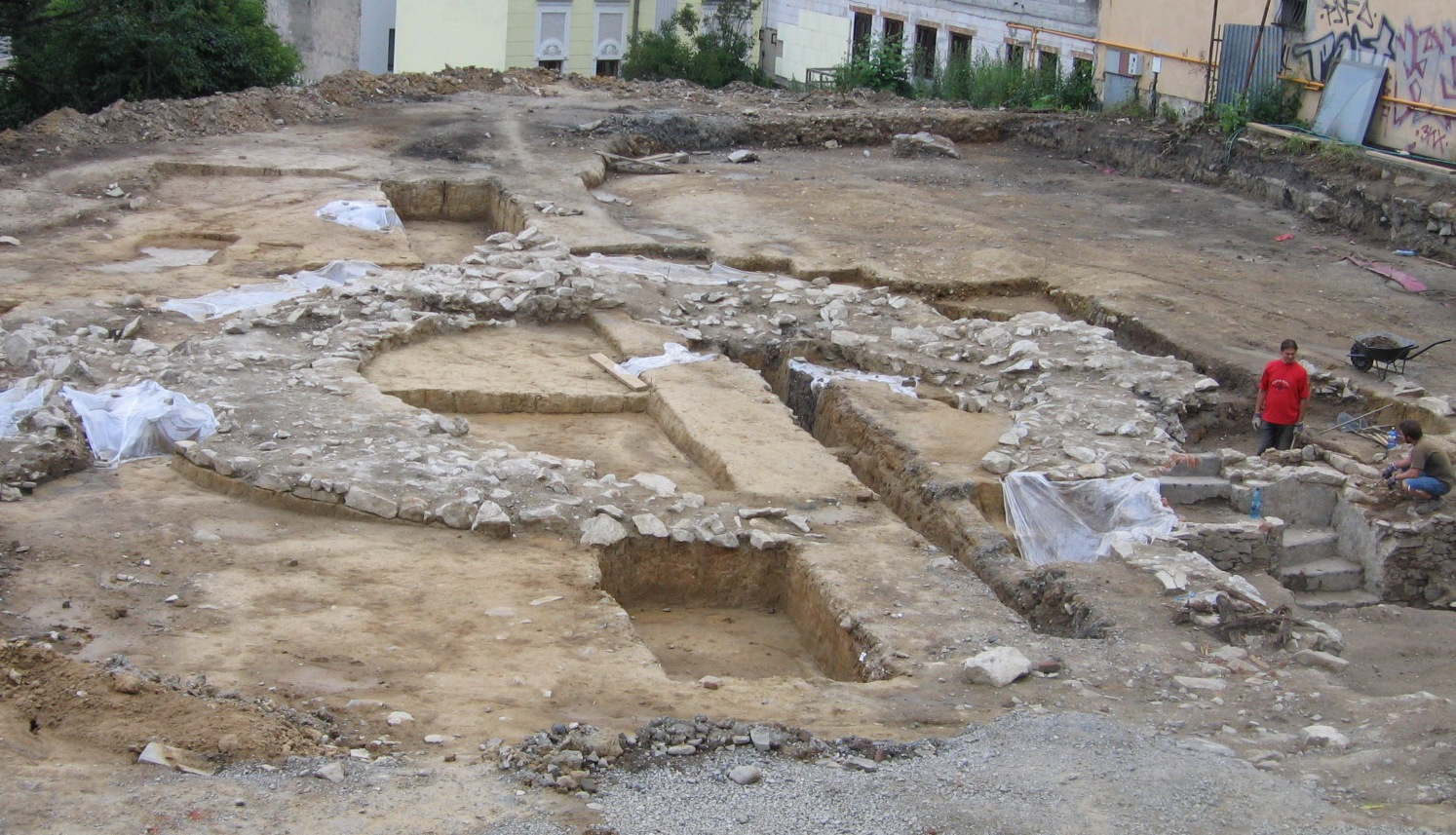 Archeologický prieskum ruín Žilinského hradu